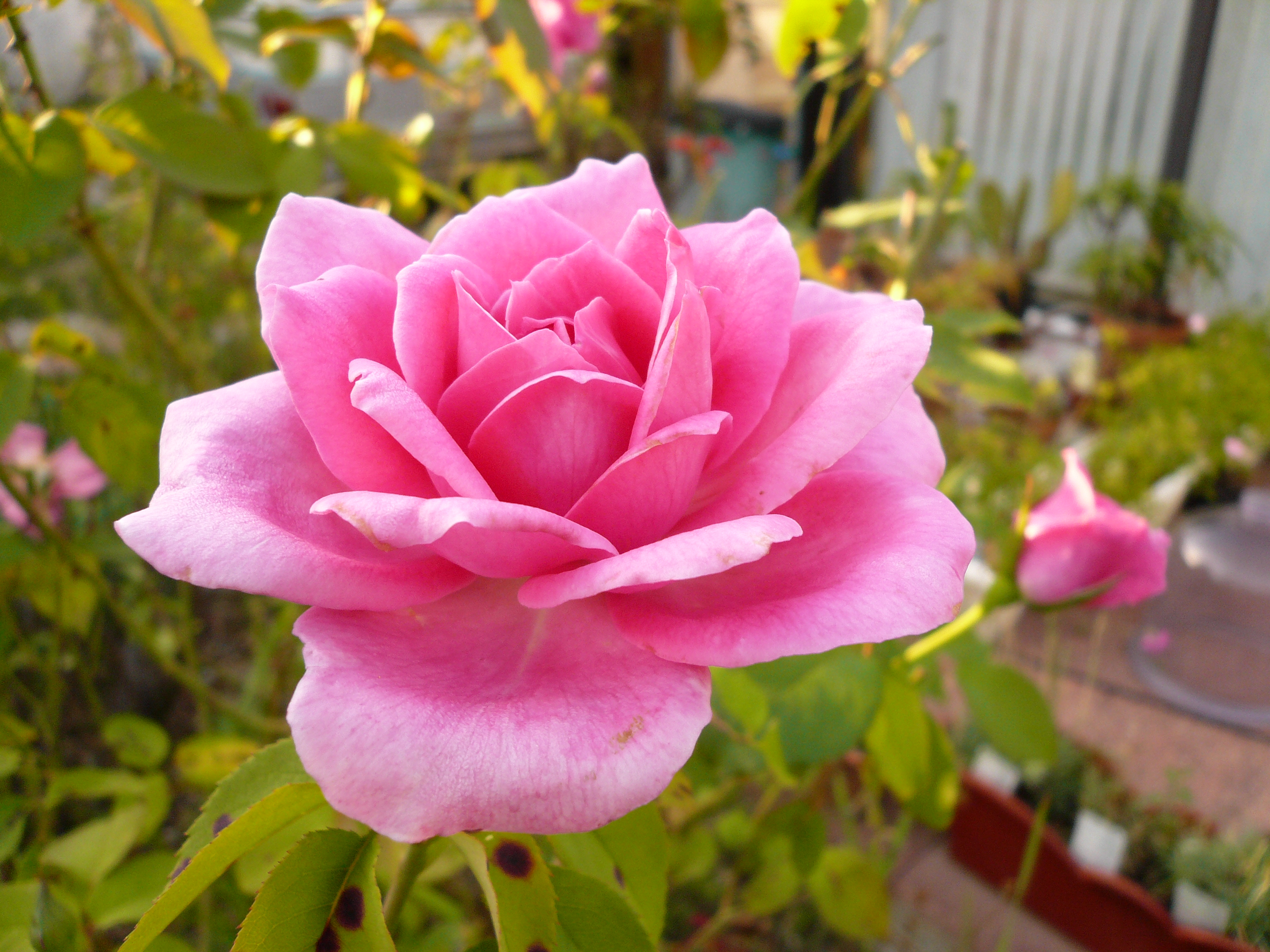 Rose rose